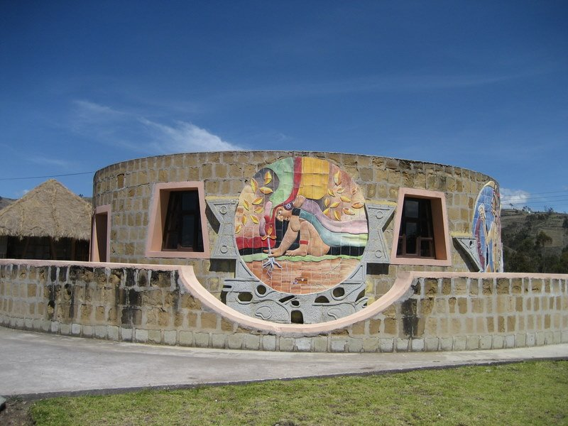 Pucara Tambo